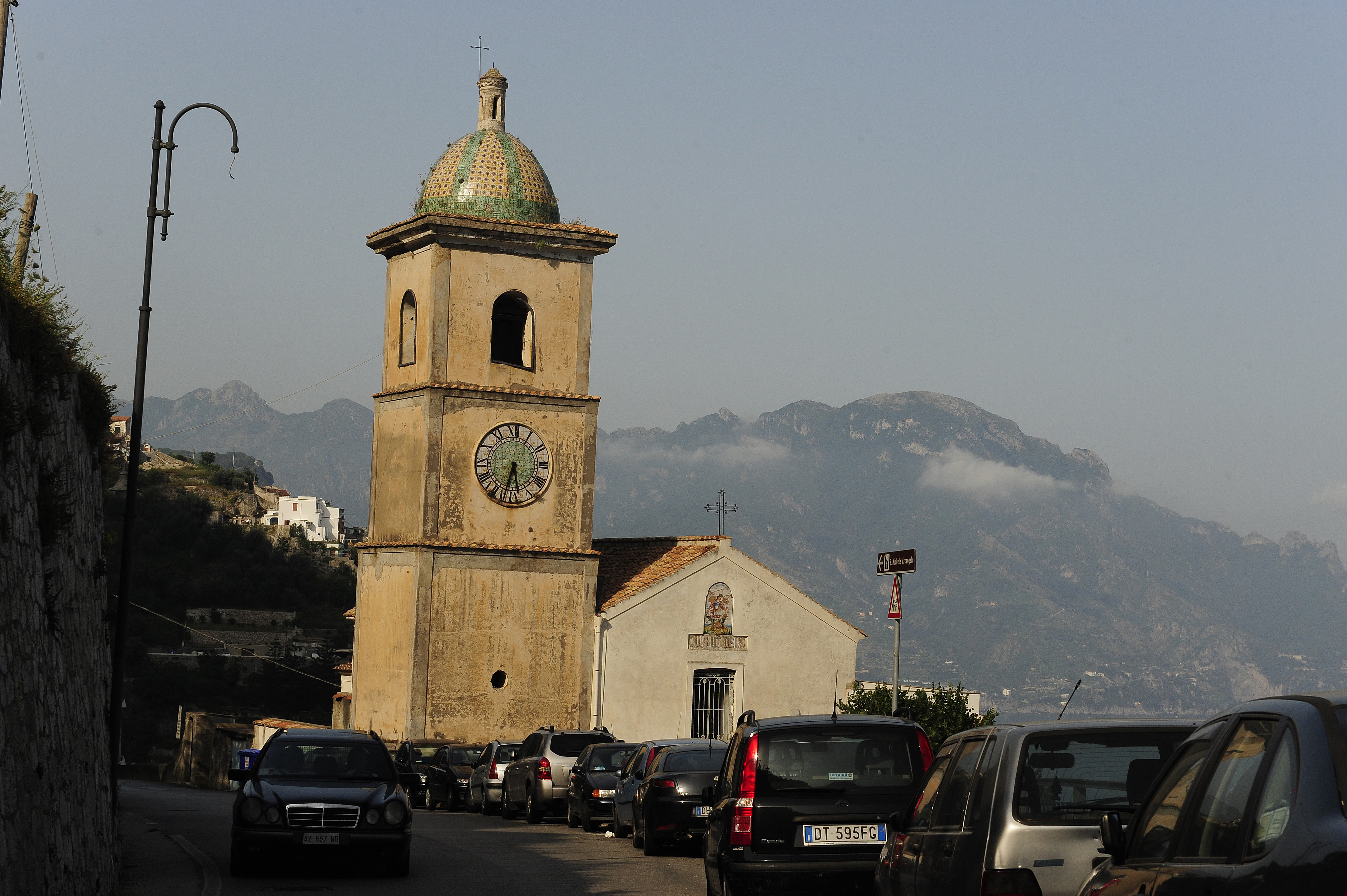 Golfo de Nápoles e Costa Amalfitana - Italia. De 11 ao 15 de julho de 2011.